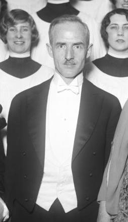 Der weltberühmte Dayton-Westminster-Chor aus Amerika gastiert zum erstenmal in der Philharmonie in Berlin! Die Präsidentin des Dayton-Westminster-Chors Mrs. H.E. Talbot (Mitte) mit dem amerikanischen Botschafter in Berlin Dr. Gould Shourmann (rechts) und dem Dirigenten des Chors Dr. John Finley Williamson (links) nach dem ersten erfolgreichen Konzert in der Philharmonie in Berlin.